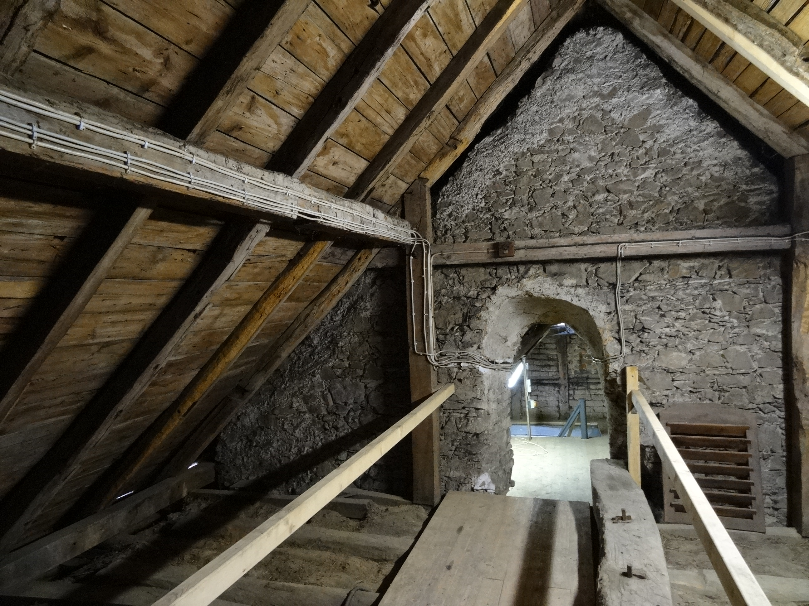 Blick im Dachstuhl vom Hauptschiff durch den später hinzugekommenen Durchgang im alten Westgiebel Richtung Dachstuhl des westlichen Eingangsportals mit Treppe zum Dachstuhl, evangelische Kirche Allendorf/Lahn